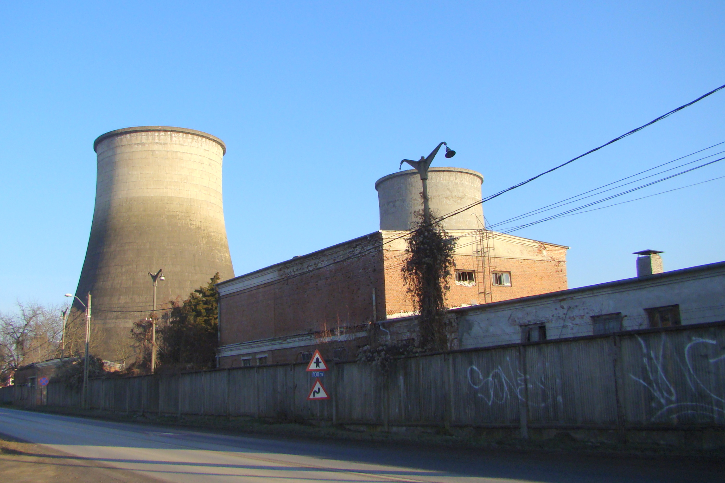 Fosta termocentrală din Fântânele, judeţul Mureș